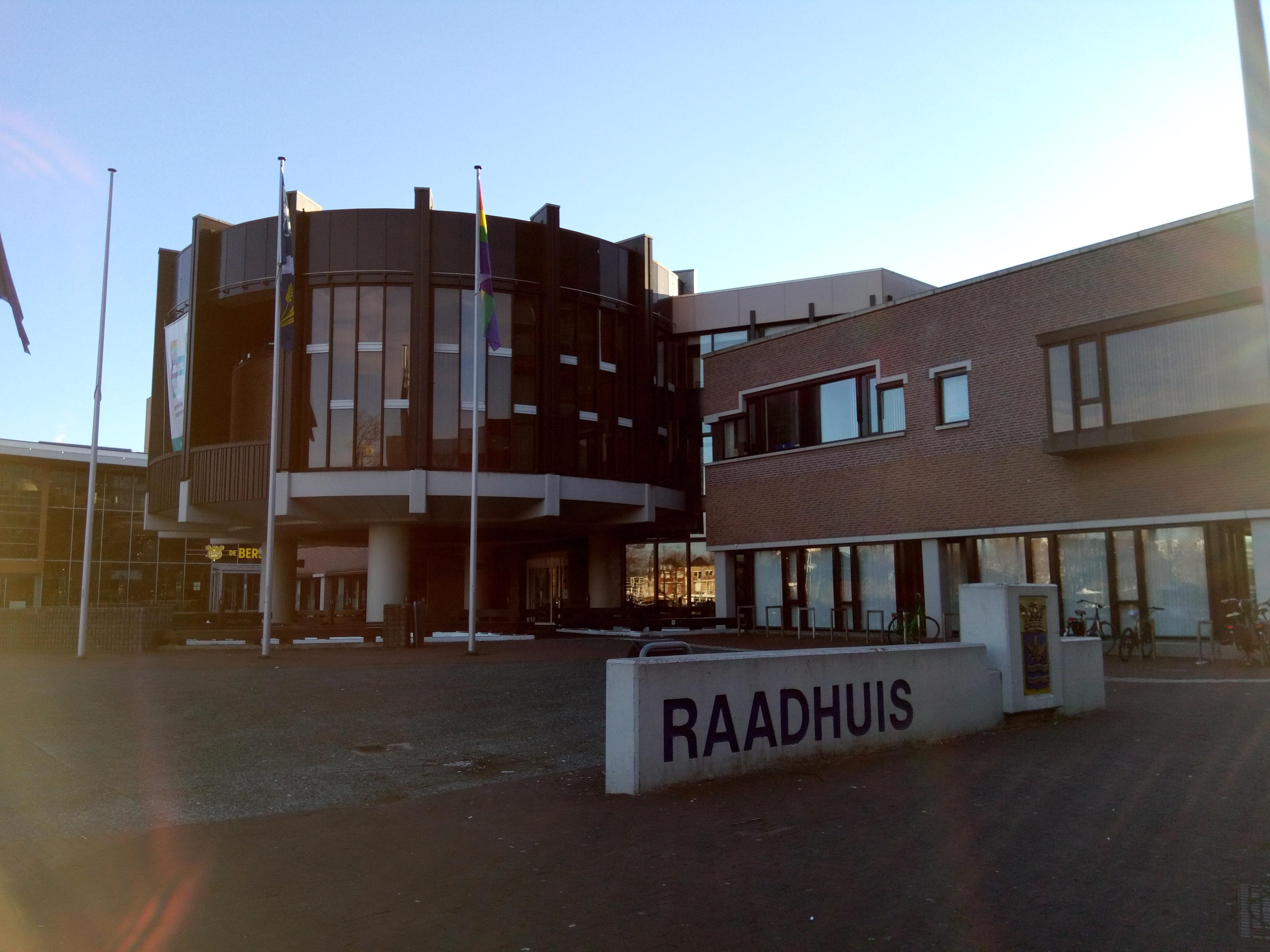 Zij aanzicht raadhuis Hoofddorp, gemeente Haarlemmermeer